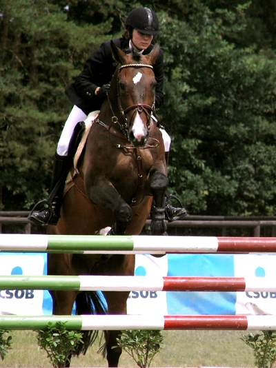 Český teplokrevník